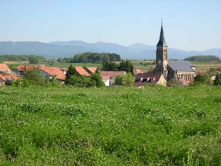 Village de Meroux (Territoire de Belfort) Photo prise en mai 2004 par LP90 Licence GFDL LP90 mai 2004